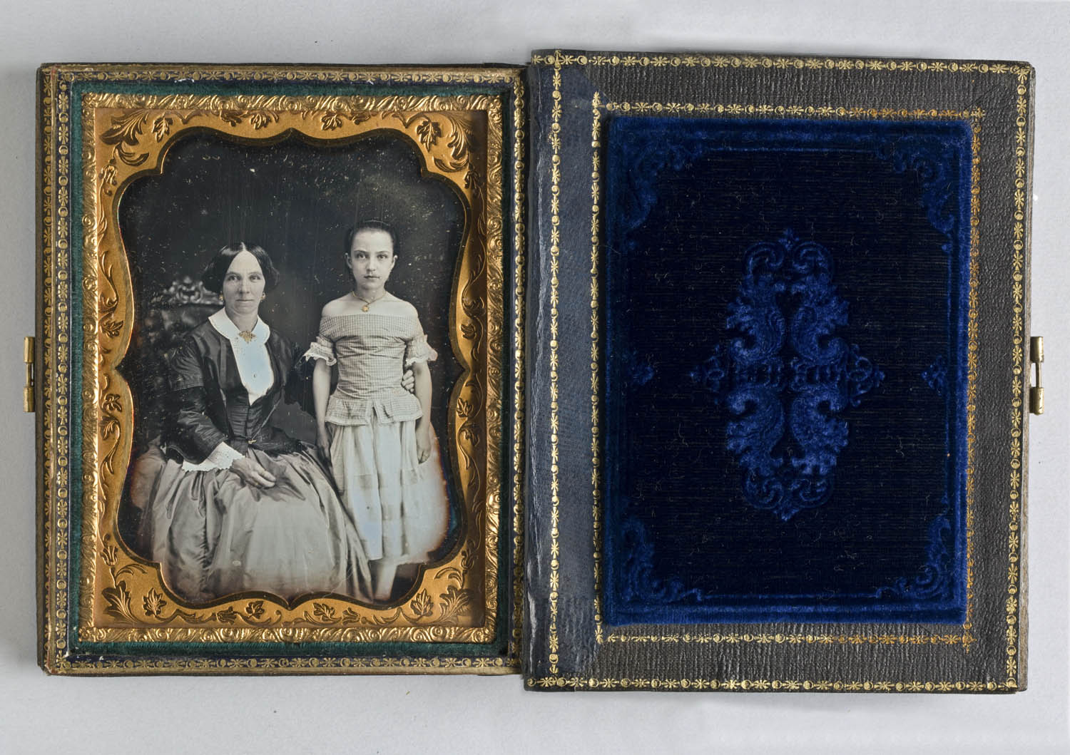 Dubbelporträtt, kvinna och flicka. Dagerrotyp / daguerreotyp i etui, kolorerad. Nordiska museet inv.nr 113499.